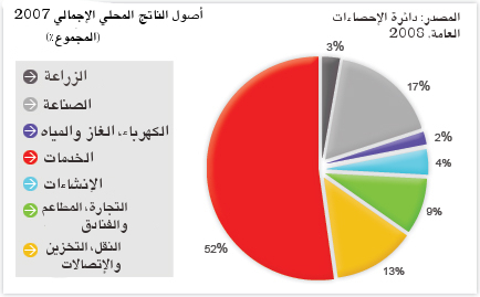 صول الناتج المحلي الإجمالي 2007. قطاعات الاقتصاد الأردني.